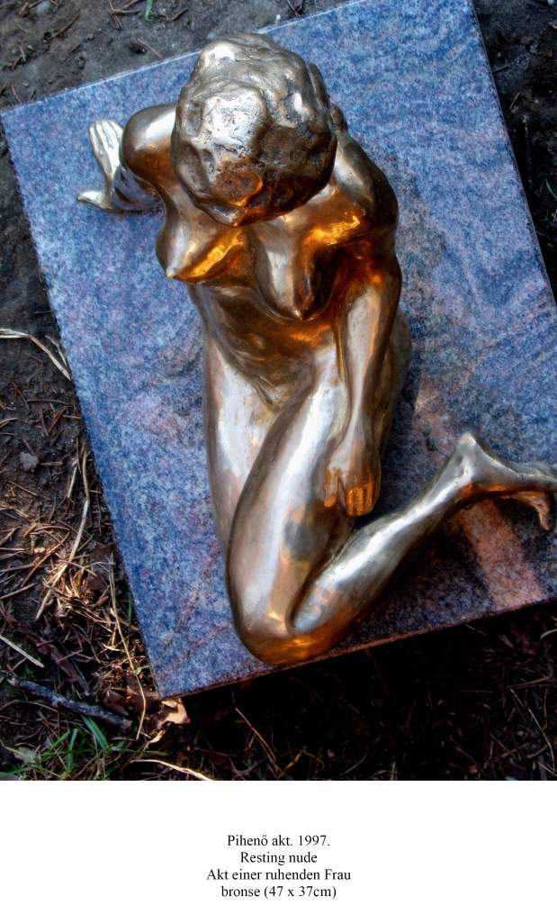 Pihenő akt (bronz), 47×37 cm; Csíky László szobra